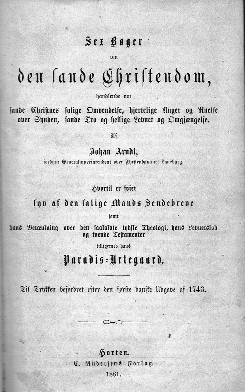 Johann Arndts sanne kristendom